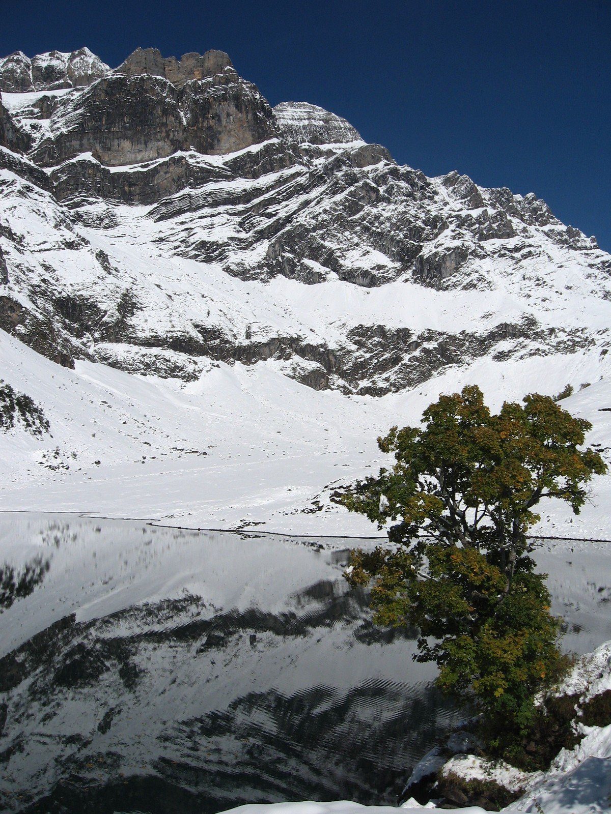 Oberblegisee und Vrenelisgärtli (der weisse Gipfel Mitte rechts) und Nidfurner Türme (höchster Horizont)